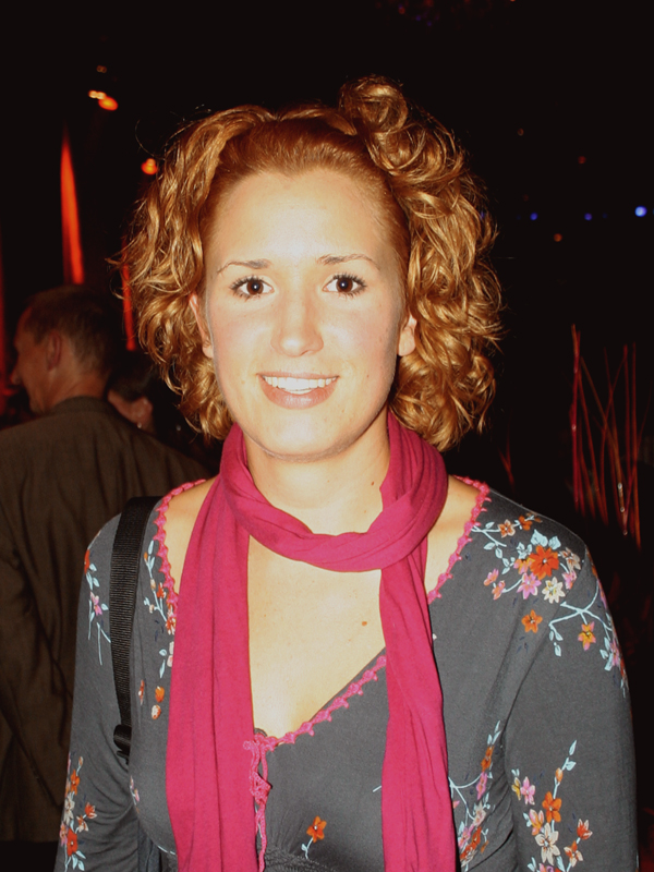 Die Schauspielerin Miriam Krause (u. a. "Sturm der Liebe", "Sesamstraße" im Oktober 2006 in München.